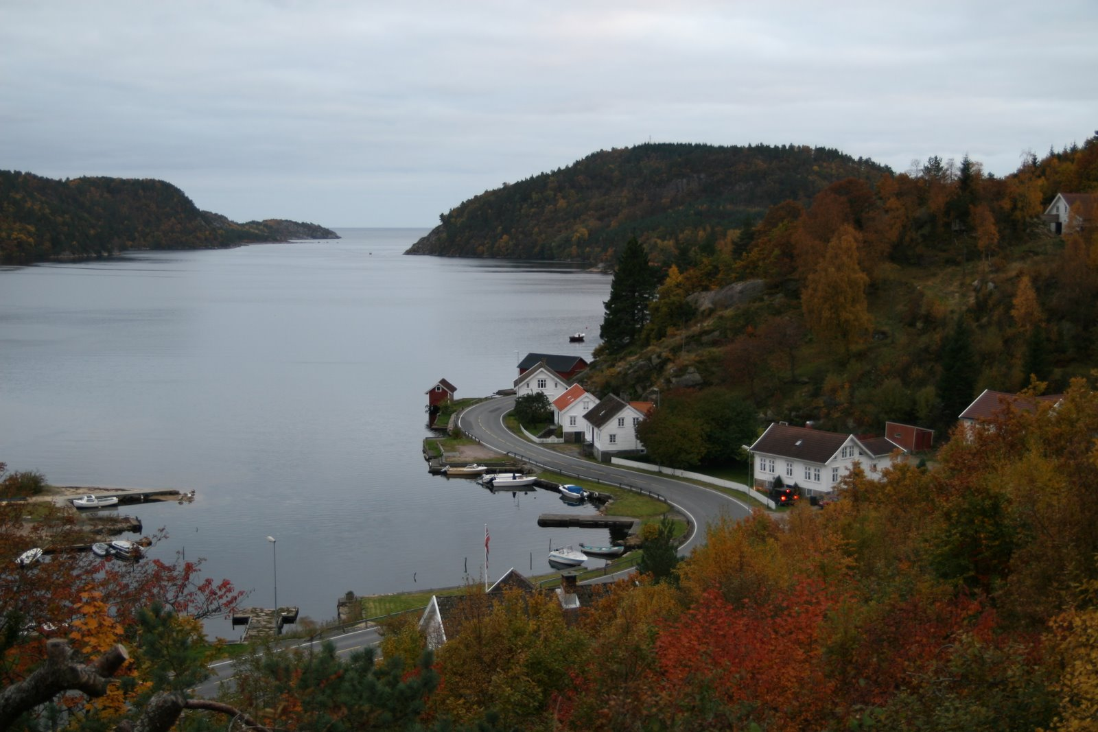 Sniksfjorden fra heia i Snik.